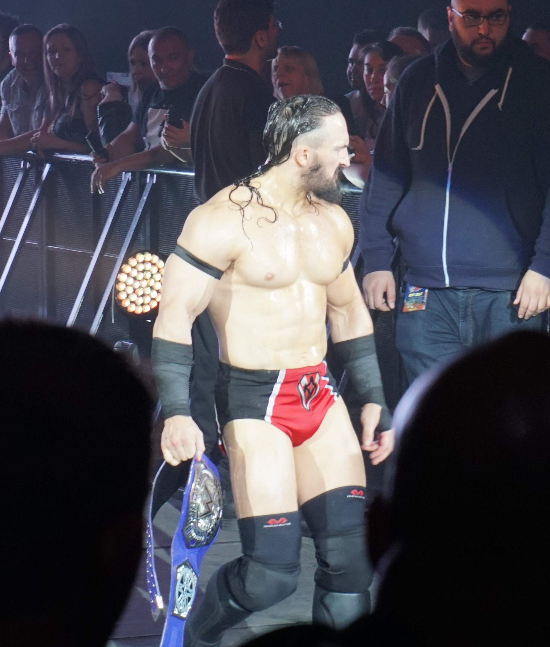 Neville (c) defeats Aleister Black & Austin Aries (in Title Triple Threat Match) Info on the match : WWE Cruiserweight ( Le vendredi 12 mai, la WWE Live Tour fera escale au Country Hall a Liege pour le spectacle de catch de l'annee! Au programme: des duels impitoyables et des rencontres captivantes entre les meilleures equipes et les plus grands rivaux. )